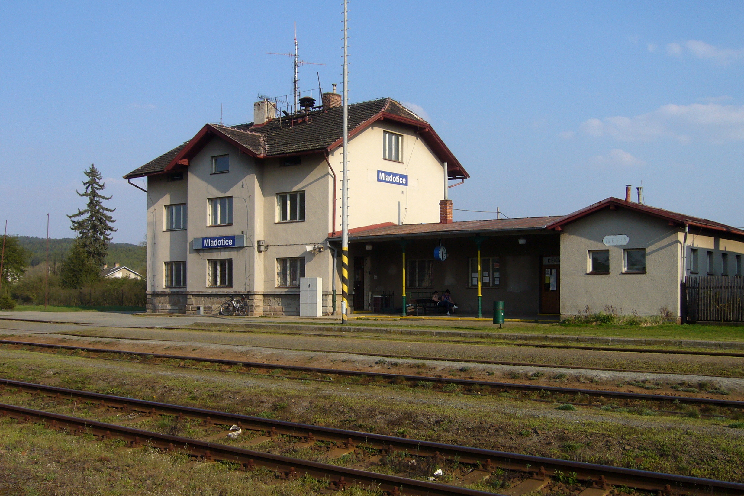 Mladotice – nádraží